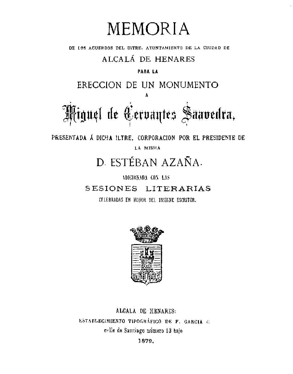 Portada del libro de dirigido por Esteban Azaña, alcalde de Alcalá de Henares, con motivo de la inauguración del monumento dedicado a Miguel de Cervantes el 9 de octubre de 1879 en dicha ciudad. Impreso en Alcalá de Henares por Federico García Carballo.